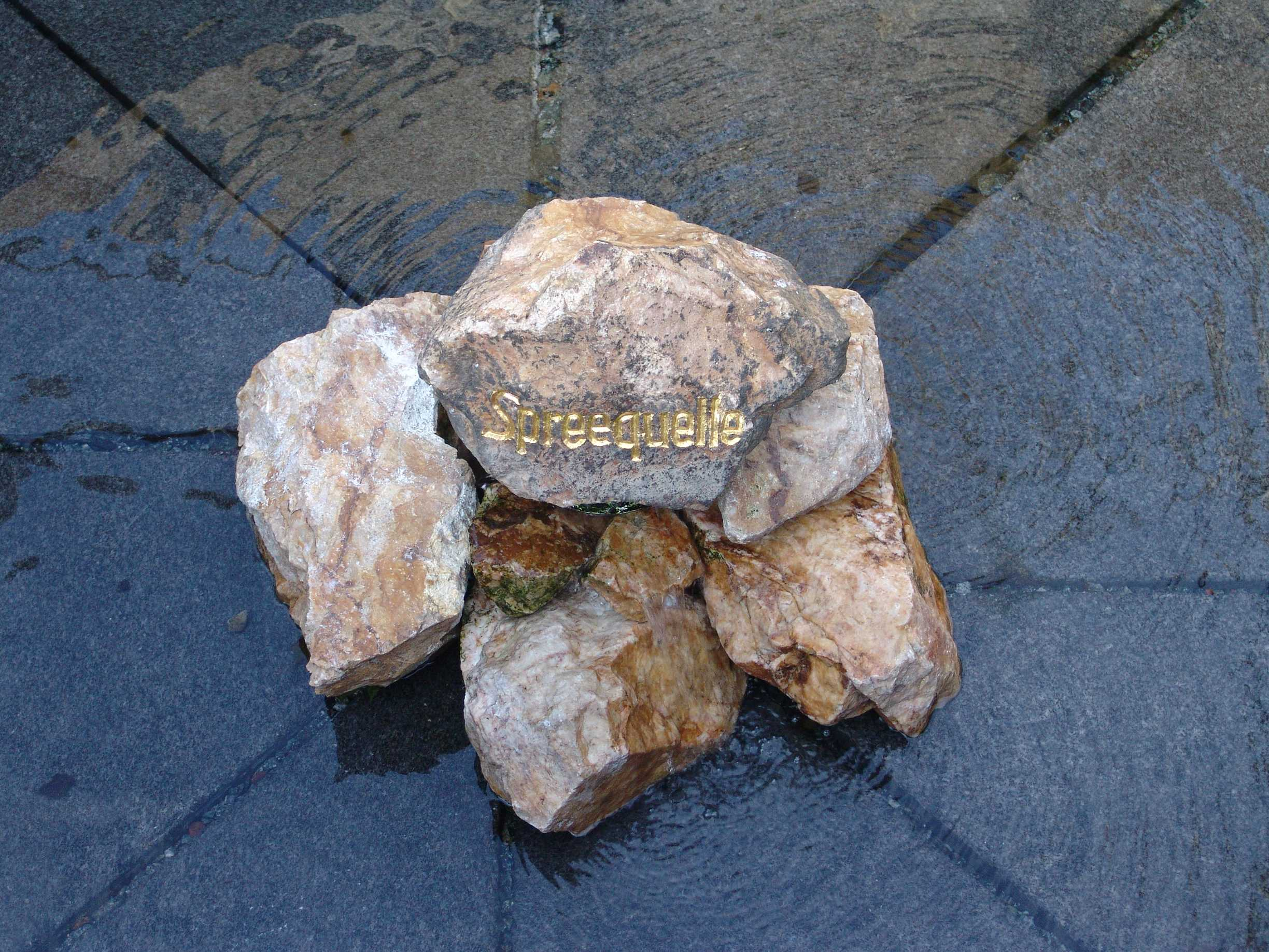 Detail der Spreequelle in Neugersdorf, Landkreis Görlitz, Sachsen